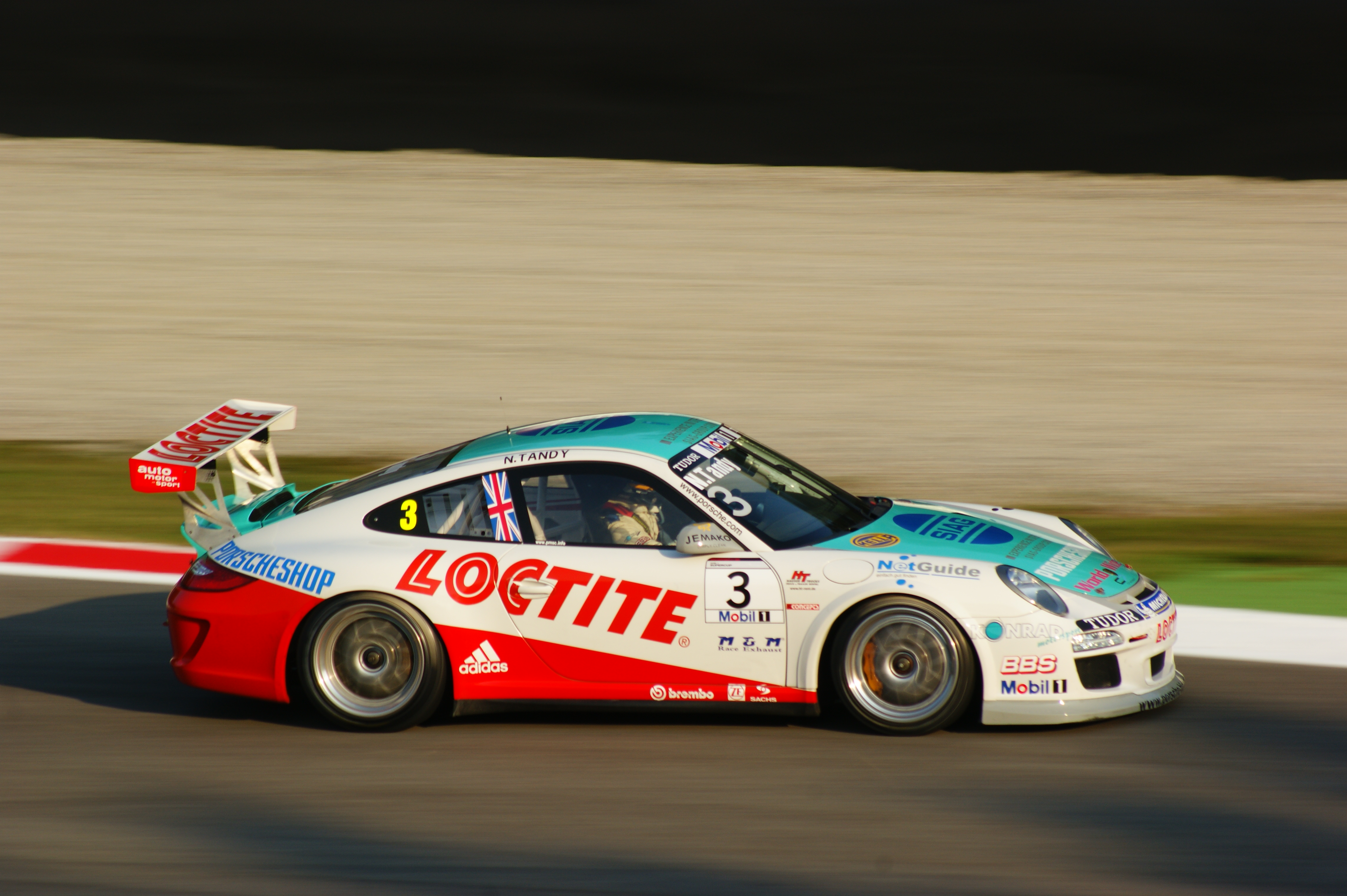 Nick Tandy alla variante Ascari Monza 2011